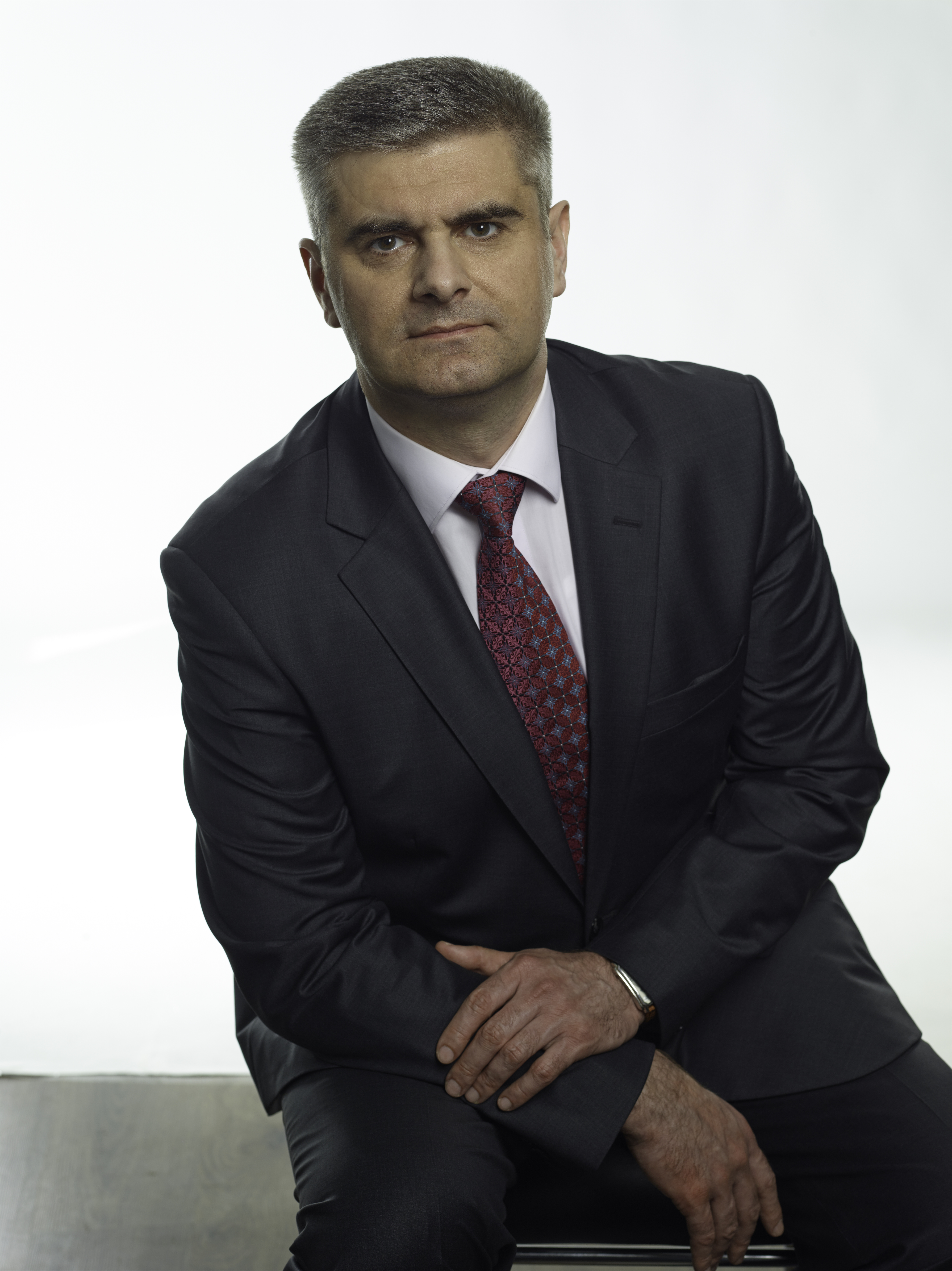 В. Онуфрійчук